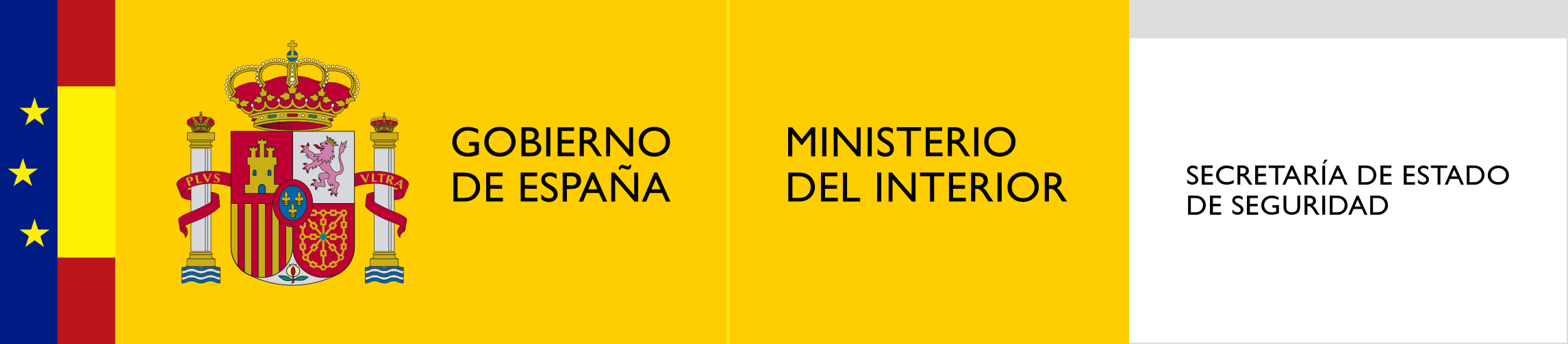 Logotipo de la Secretaría de Estado de Seguridad